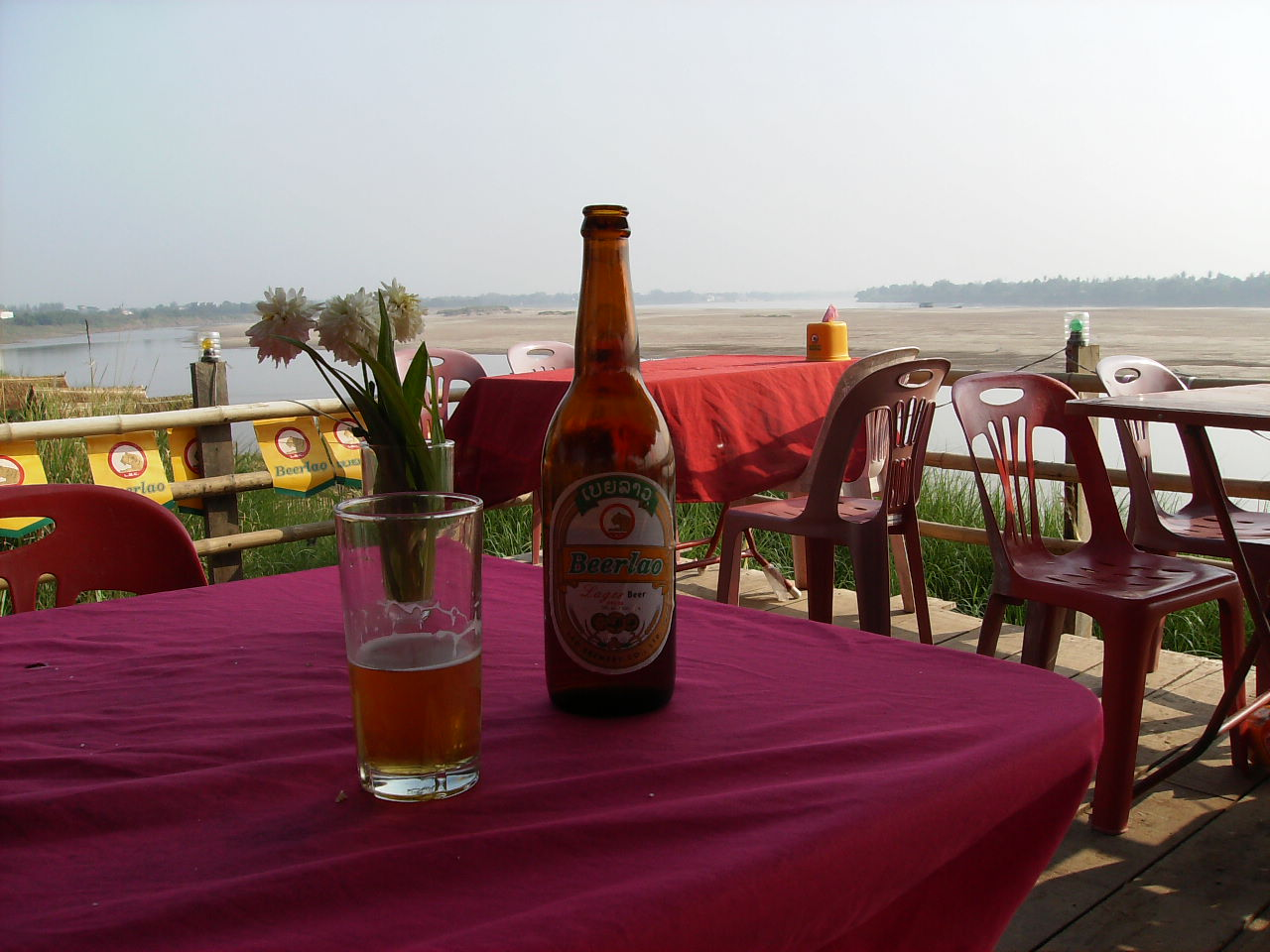 Bouteille de Beerlao sur le bord du Mékong à Vientiane